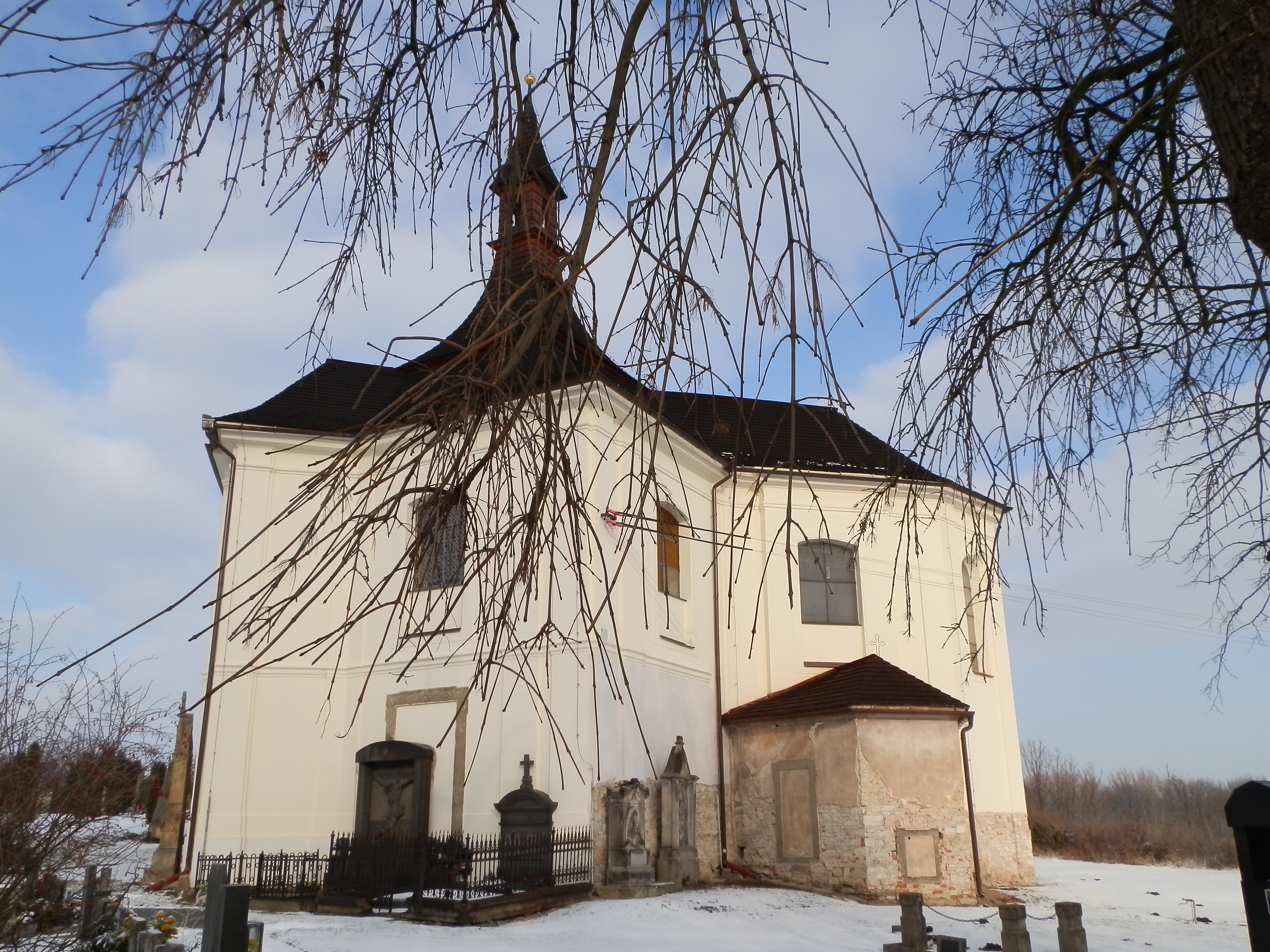 Kostel sv. Martina, Chrašice, pohled od jihu